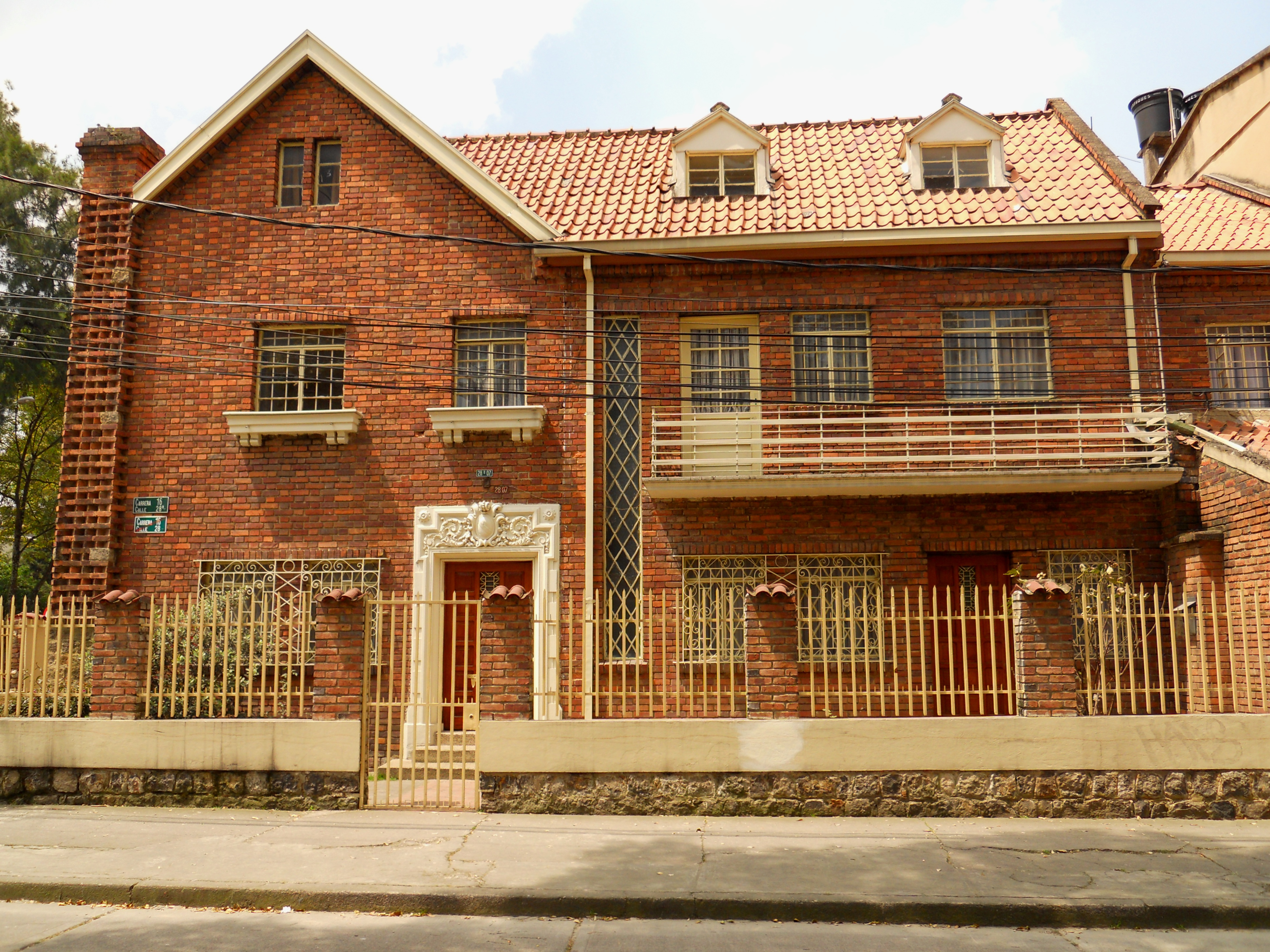 Casa en la carrera 16 con calle 28A, en el barrio Armenia de la localidad de Teusaquillo en Bogotá.